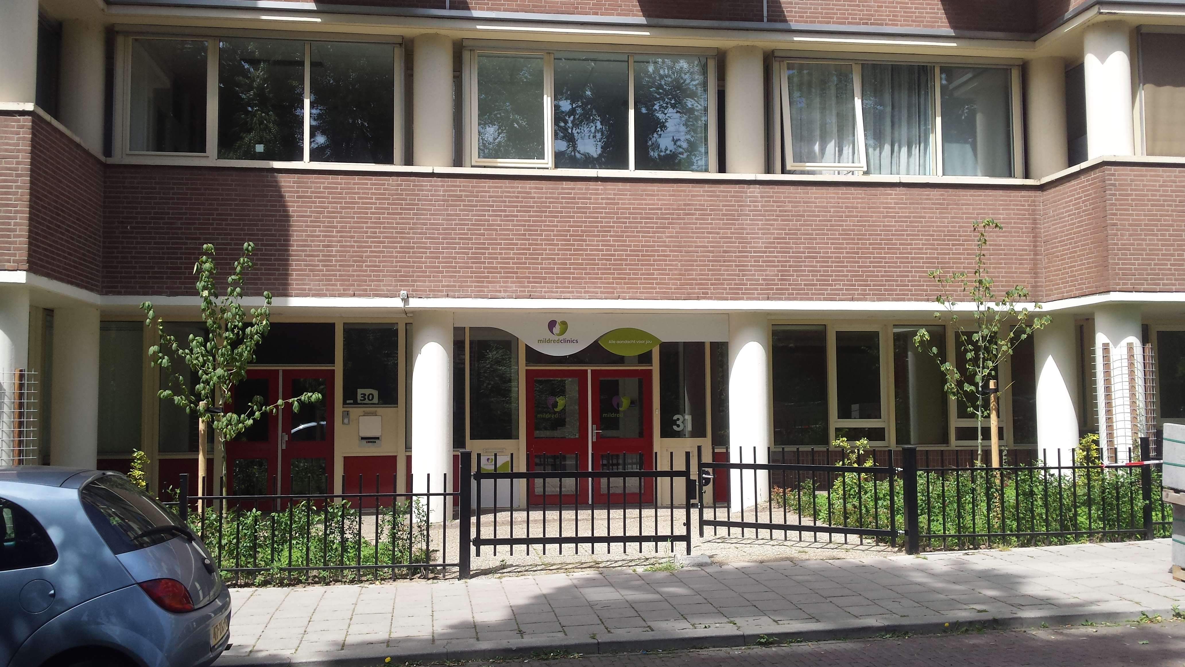 Hoofdingang van Mildred Clinics, locatie Arnhem aan Sonsbeeksingel 29–31, een abortuskliniek.